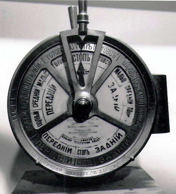 Miinafregatti Ladogan konetelegrammi, nostanut Marlin Club ry; Sotatieteen laitoksen hallussa.